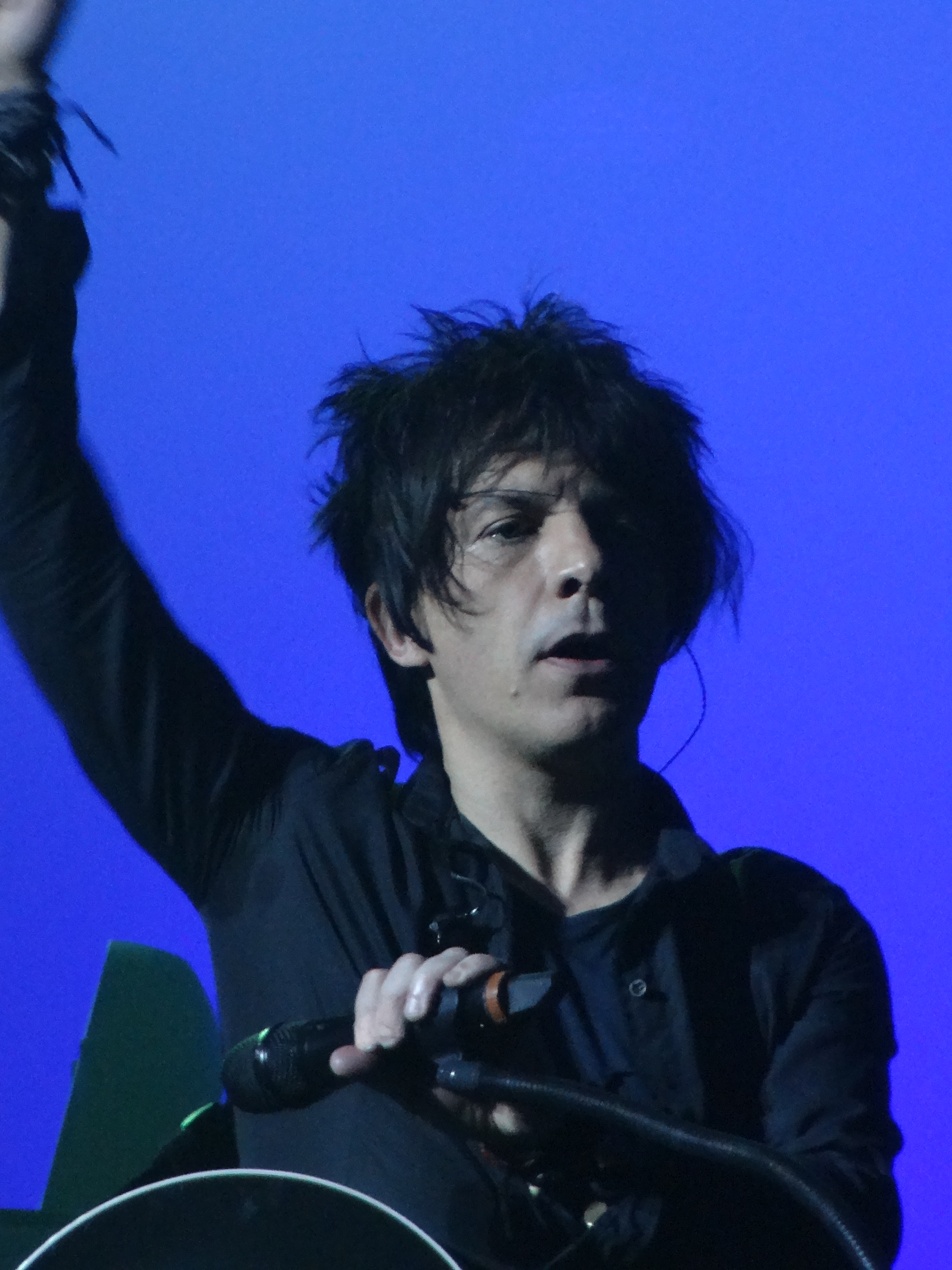 Nicola Sirkis lors du concert d'Indochine à Brest le 23 mars 2013